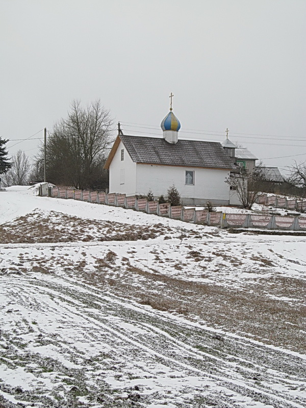 Гайна. Царква